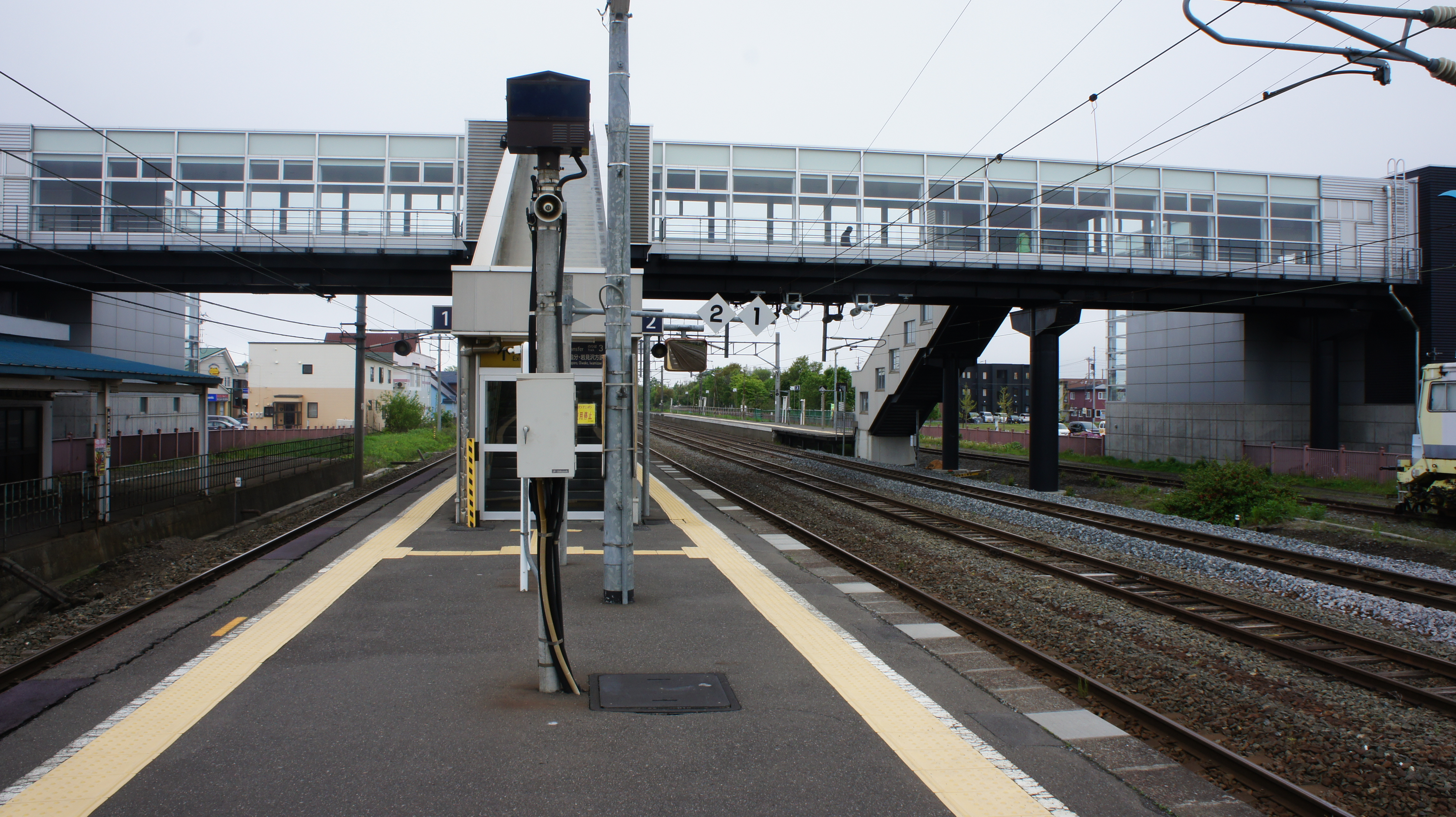 JR室蘭本線/千歳線・沼ノ端駅ホーム（1・2番線） Sony NEX-3